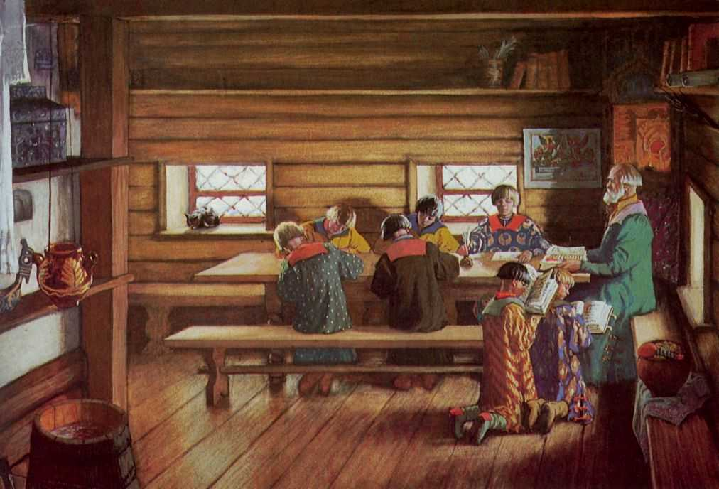 Картины по русской истории. Школа в Московской Руси - 1908